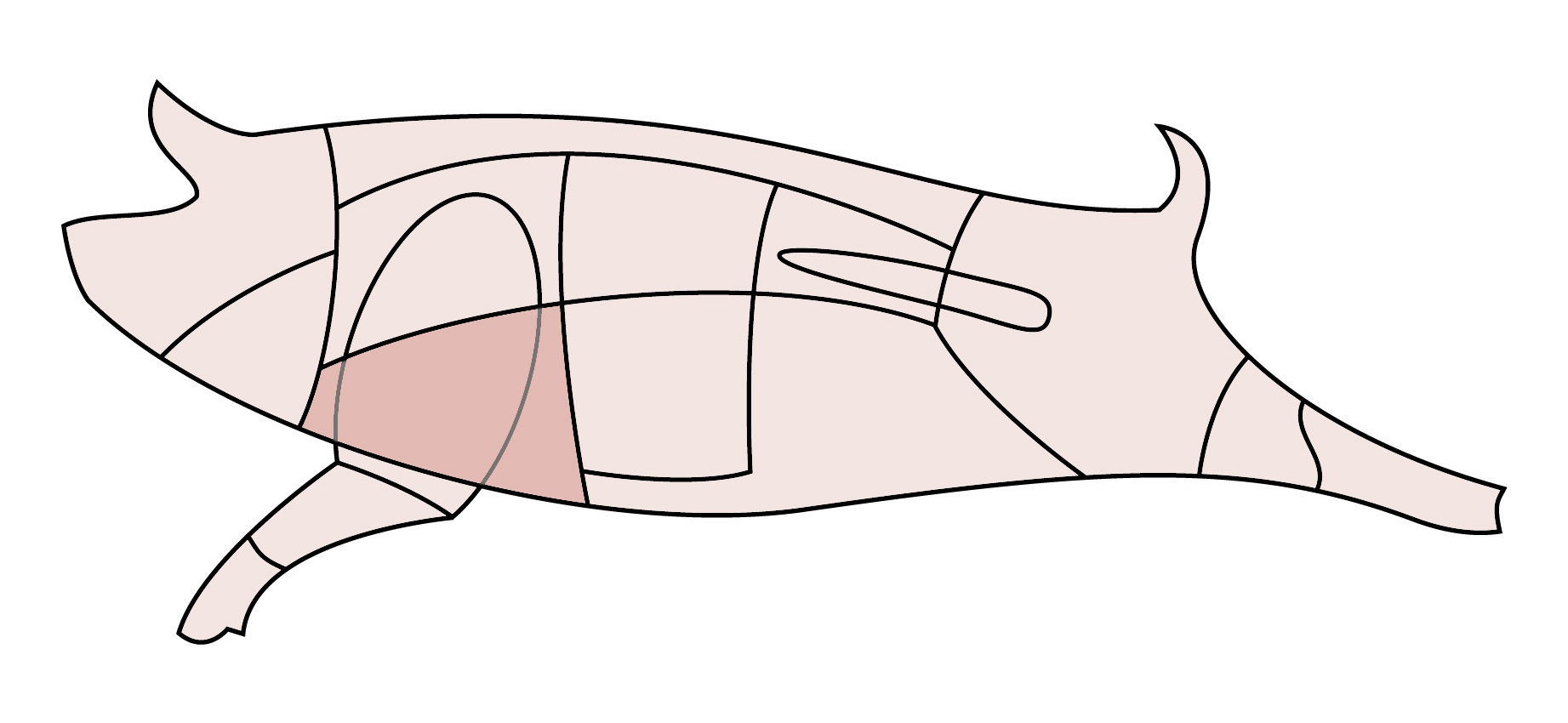 Schematische Darstellung eines Schweins, Brust.